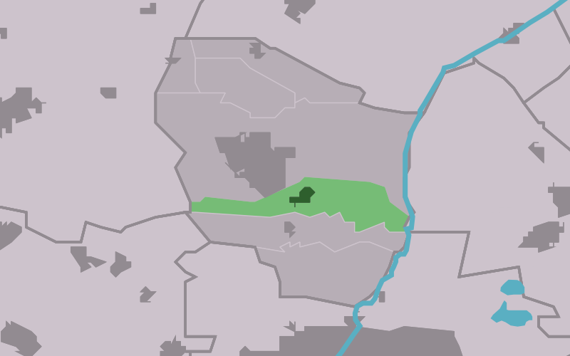 Kaartsje fan himrik fan Britsum